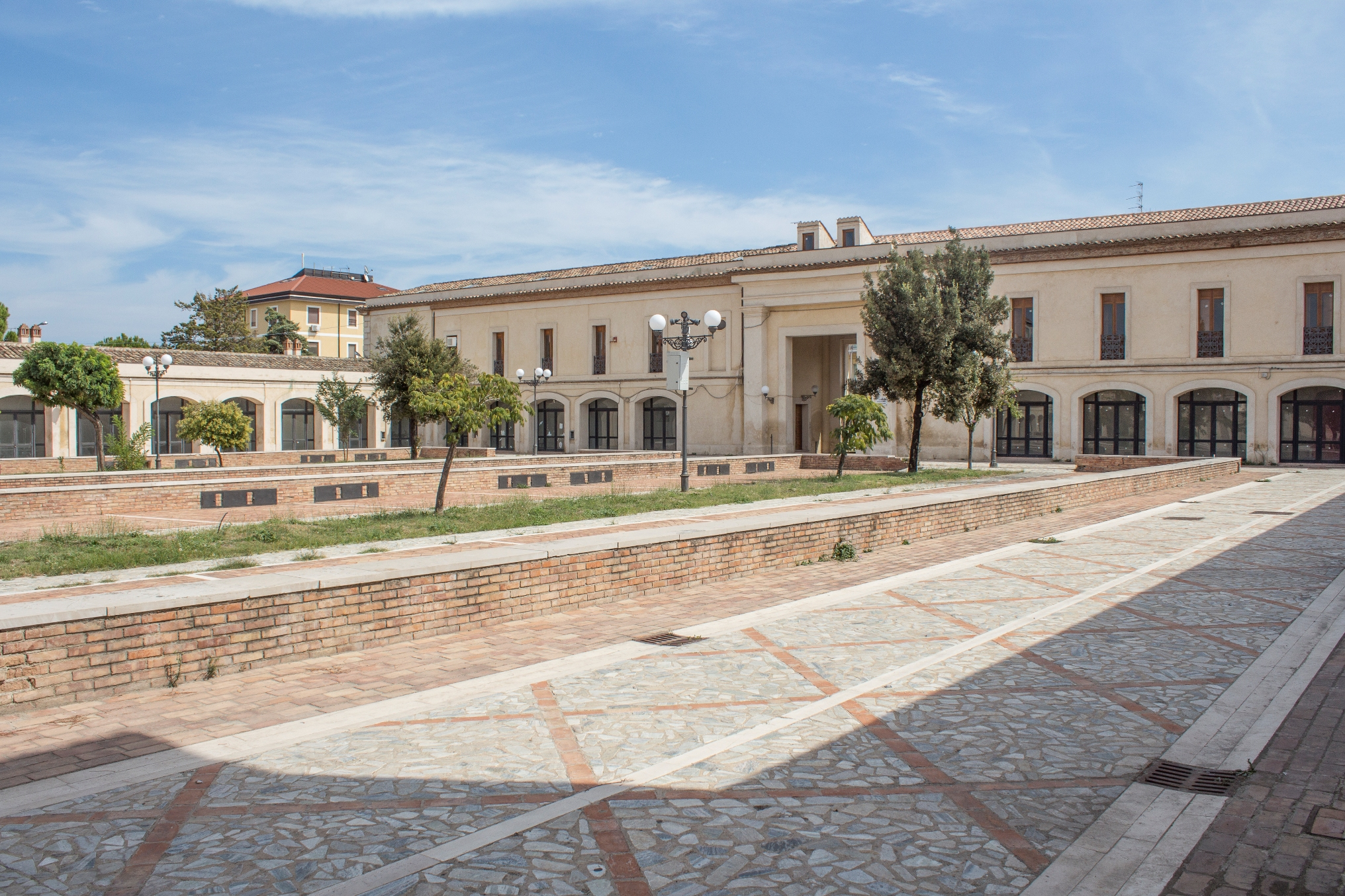 Palazzo delle Fiere o Quadrato Campagna This is a photo of a monument which is part of cultural heritage of Italy.